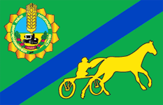 Прапор Новомиколаївського району